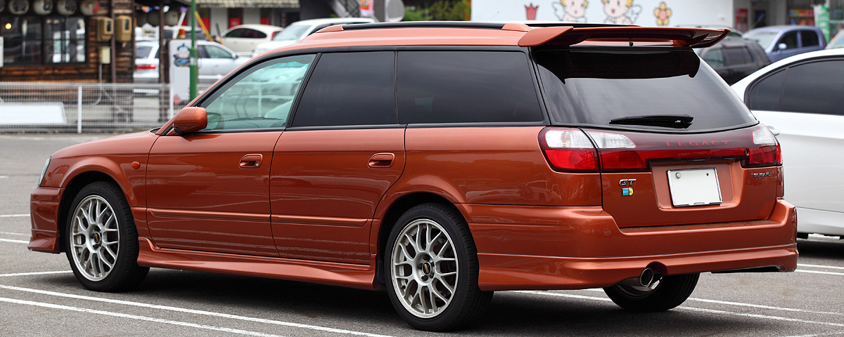 Subaru Legacy Touring Wagon 2.0 GT-B E-Tune II ( BH5 )